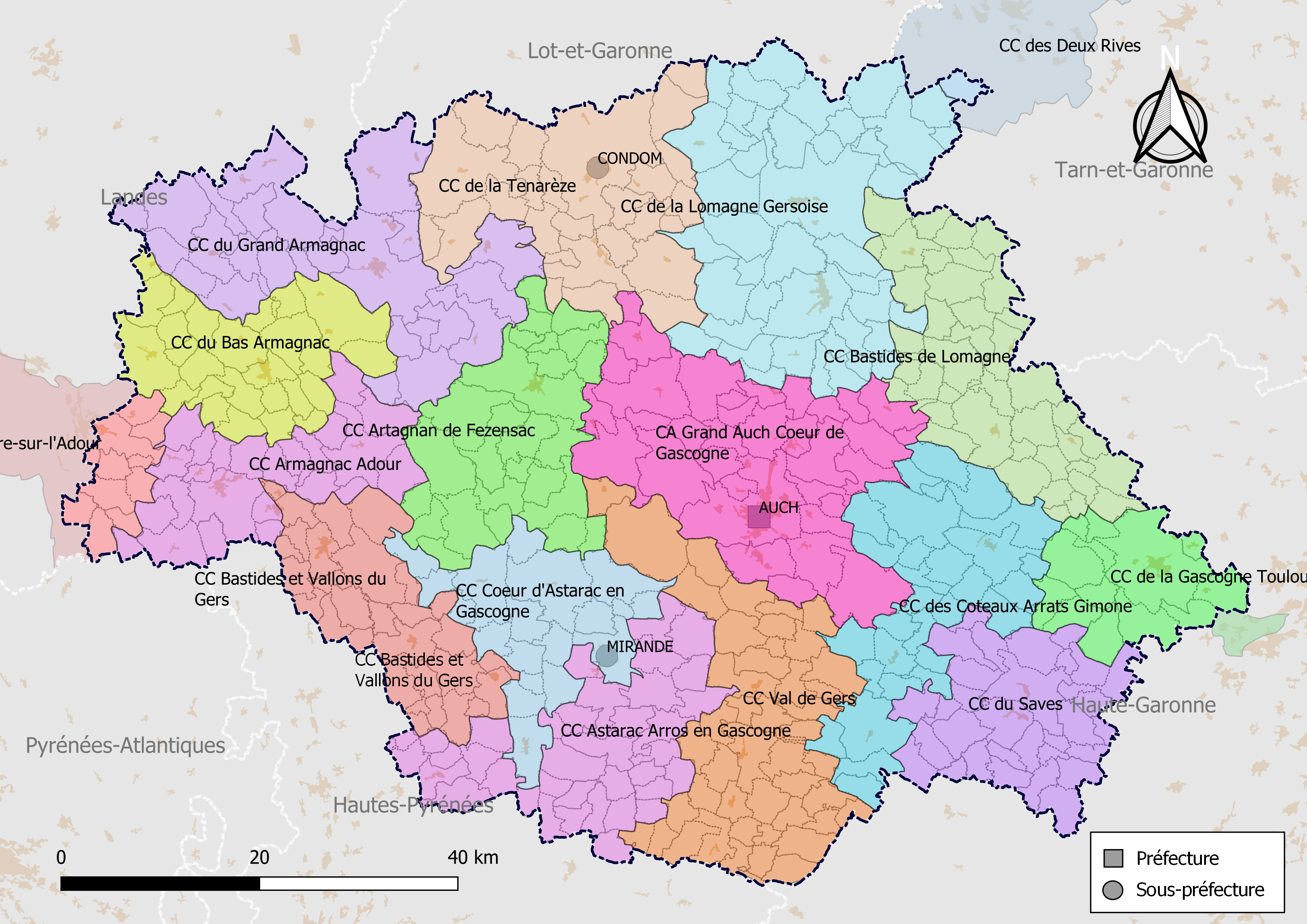 Carte des intercommunalités du département du Gers, France. Composition au 1er janvier 2019.